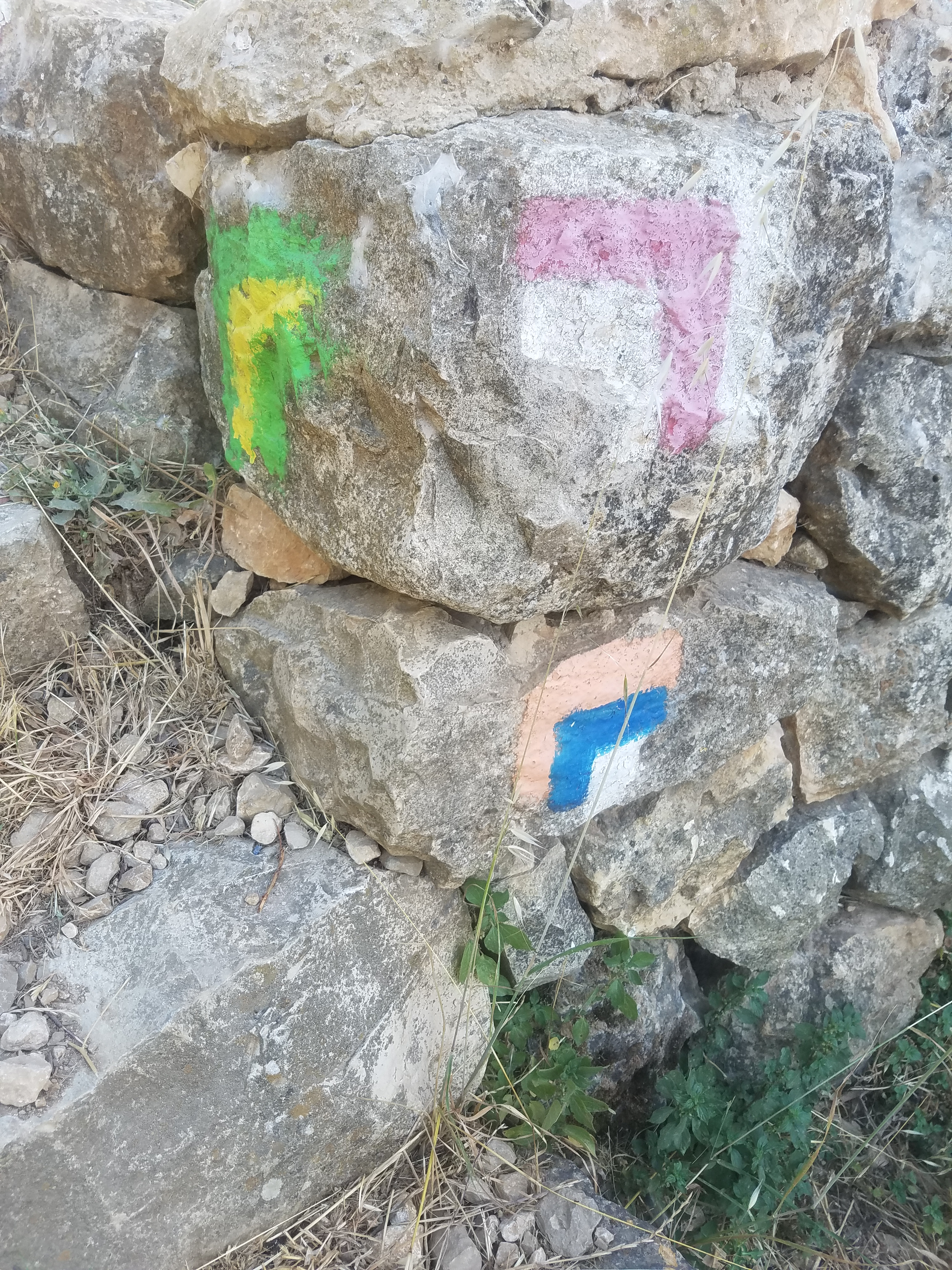 סימון שבילים בישראל. שביל ישראל. שביל גולני